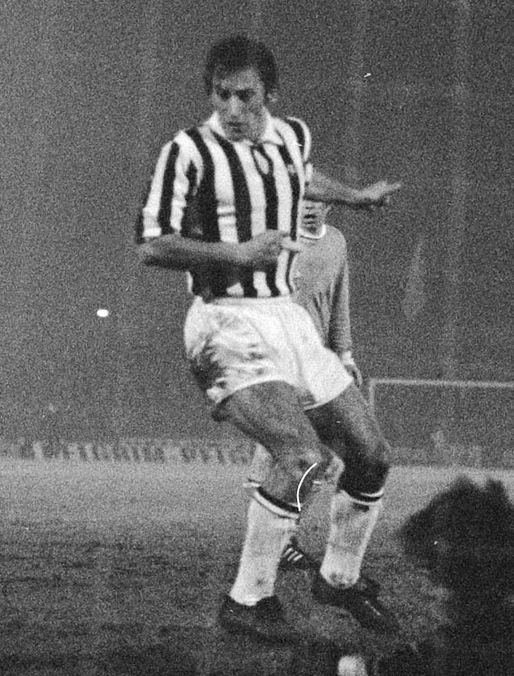 Enschede (Nederland). Kwartfinale van Jaarbeursstedenbeker 1970-71. FC Twente tegen Juventus FC 2-2; Giuseppe Furino.